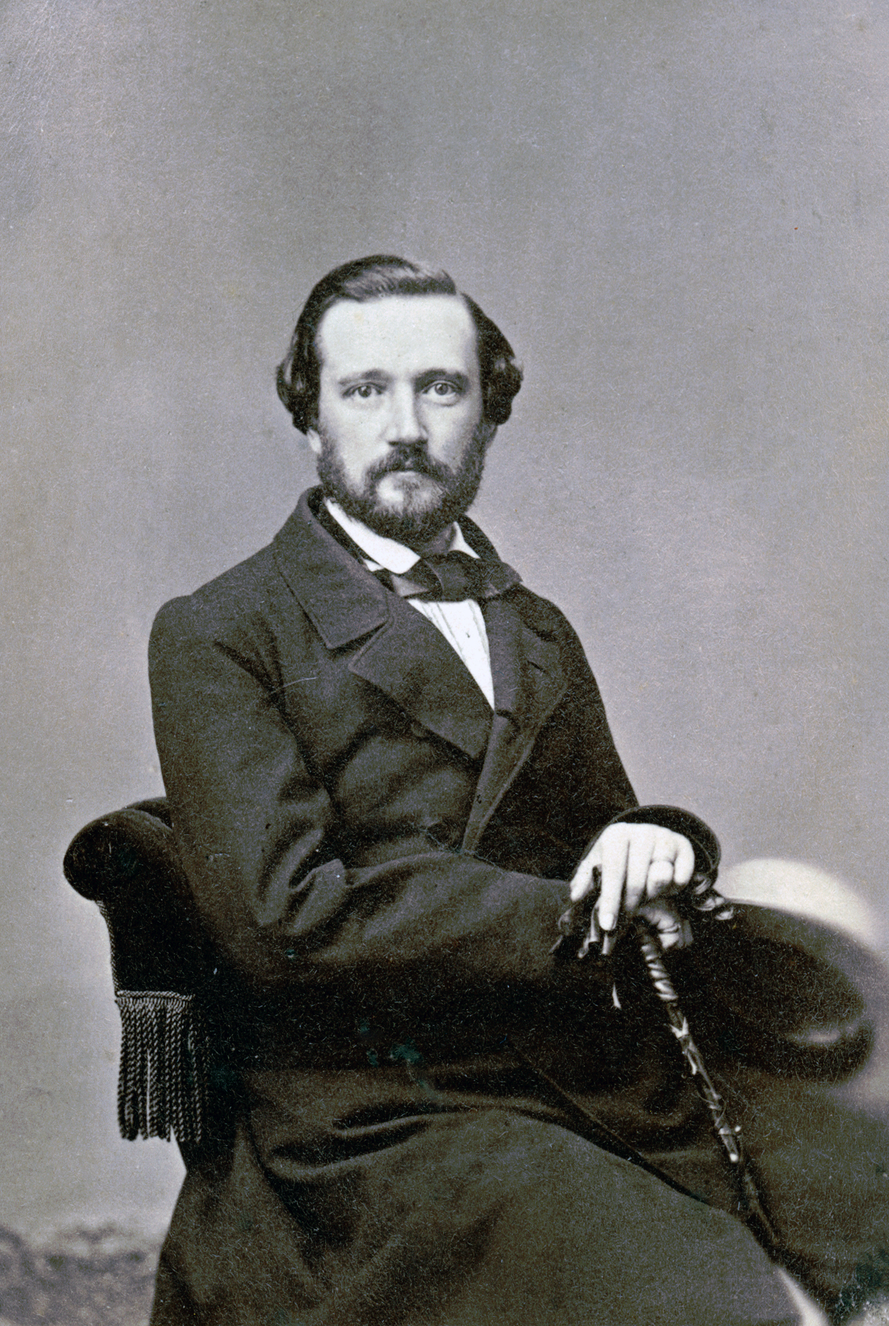 Edvard Swartz, skådespelare vid Kungliga teatern 1870